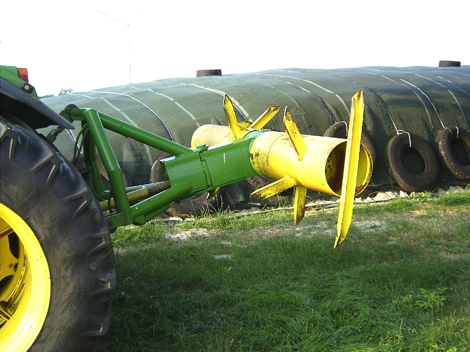 Selbstgebauter Siloverteiler an einen John Deere Traktor vor einem abgedeckten Fahrsilo. Der Siloverteiler wurde durch besfestigen zweier Stahlröhren auf einer Mercedes-Benz LKW-Achse hergestellt. Auf die Trommel wurden Eisenprofilspitzen aufgeschweißt. Die zunächst starre Konstruktion wurde nachträglich mit einem Gelenk und zwei Hyldraulikzylindern um ca. 15° seitlich schwenkbar gemacht.